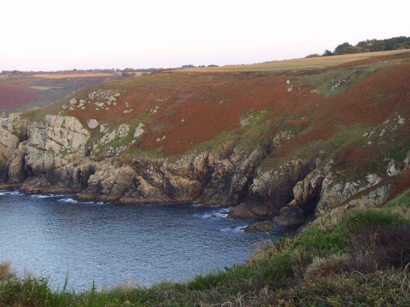 Ptéridaies (Pteridium aquilinum) dans les falaises du Cap Sizun (Finistère, France)